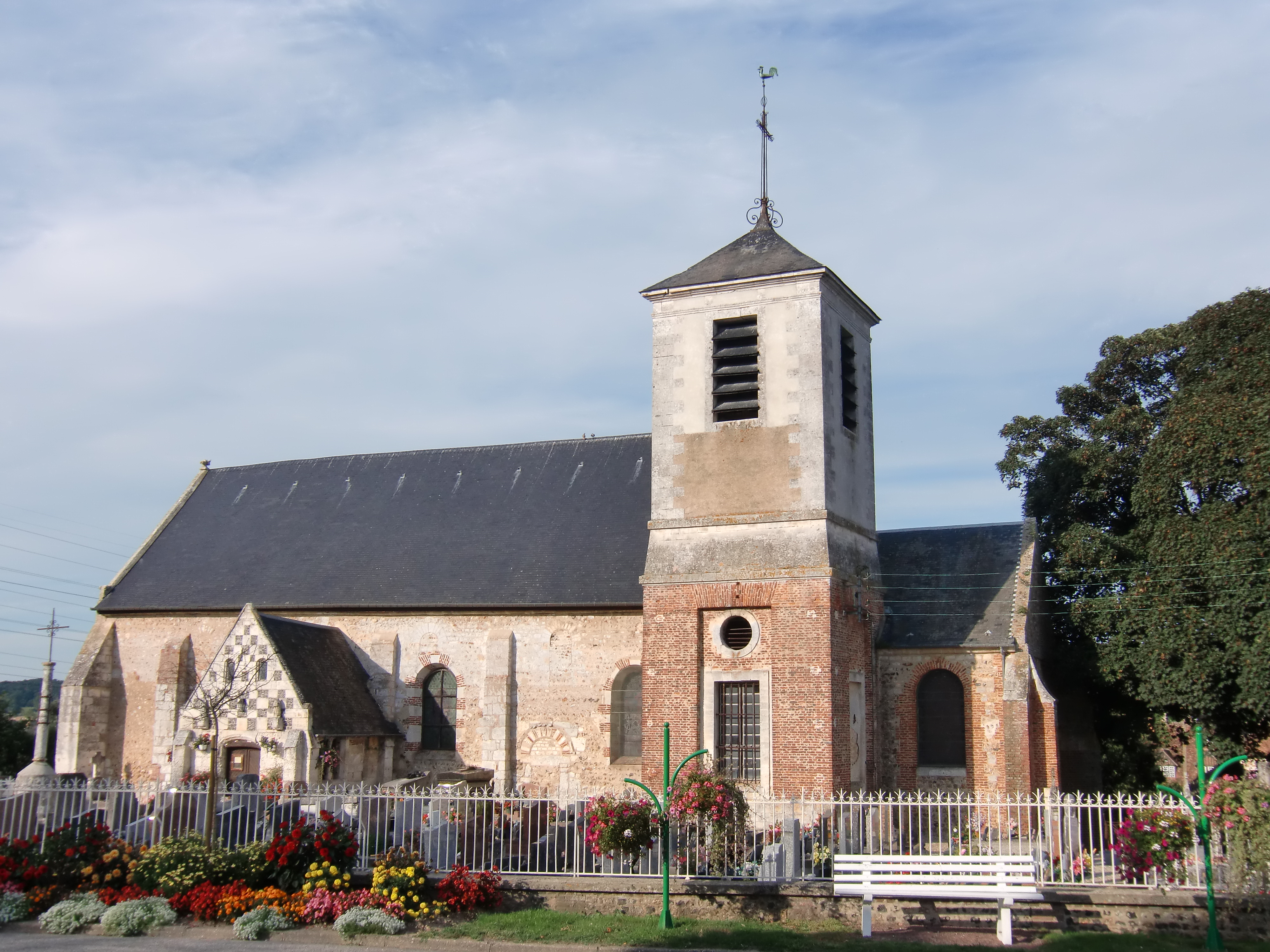 église de Condé-sur-Risle (Eure, Normandie, France)